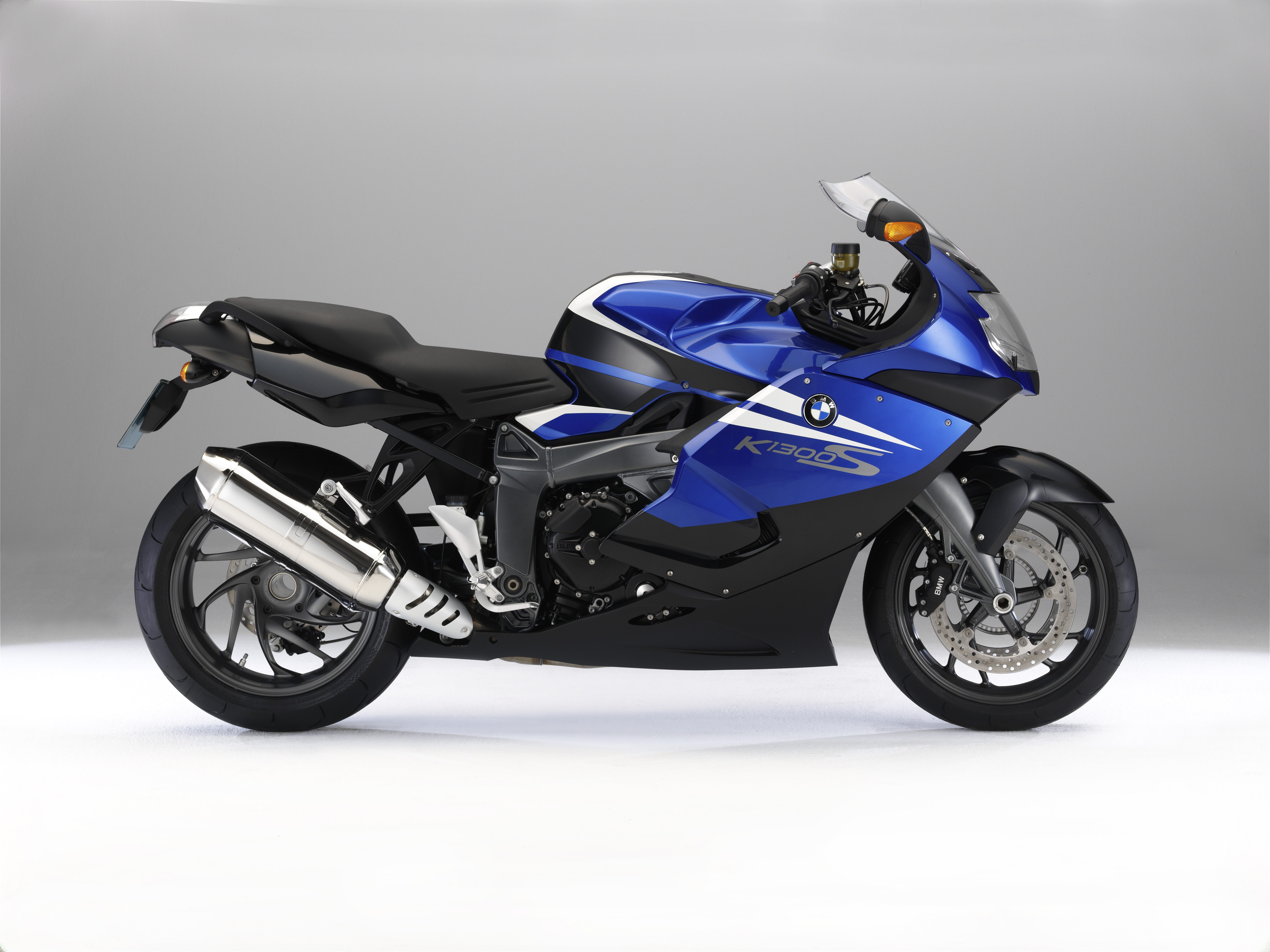 BMW K 1300 S Lupinblau metallic/Alpinweiss uni/Saphirschwarz metallic